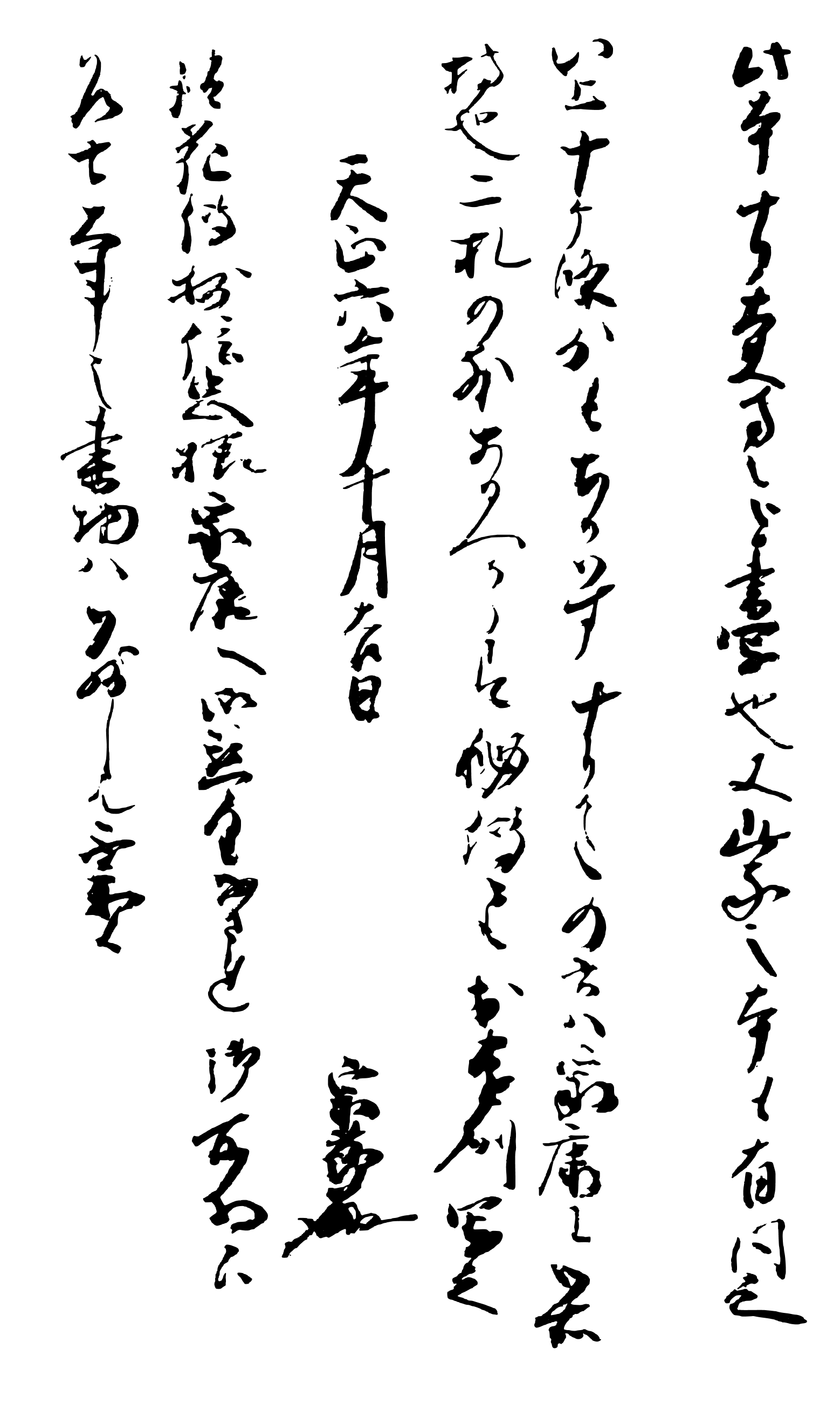 世阿弥(zeami)『風姿花伝(Kadensho, Fushikaden, Flowering Spirit)』中『花伝第七別紙口伝』の、観世宗節による写本奥書（1578年）。「此本十良大夫方之を書写也 又此家之本も有 同之 以上十ヶ条少もちかハす 十良かたの書は家康に御所持也 二札の外あるへからす 秘伝々々 於遠州写之 天正六年十月吉日 宗節（花押） 後花伝抄 信忠様家康へ御懇望なされ御所持候 乍去大事之書物ハ御残し候て不参候」（加藤周一・表章『日本思想大系24 世阿弥 禅竹』（岩波書店、1974年）解説より）